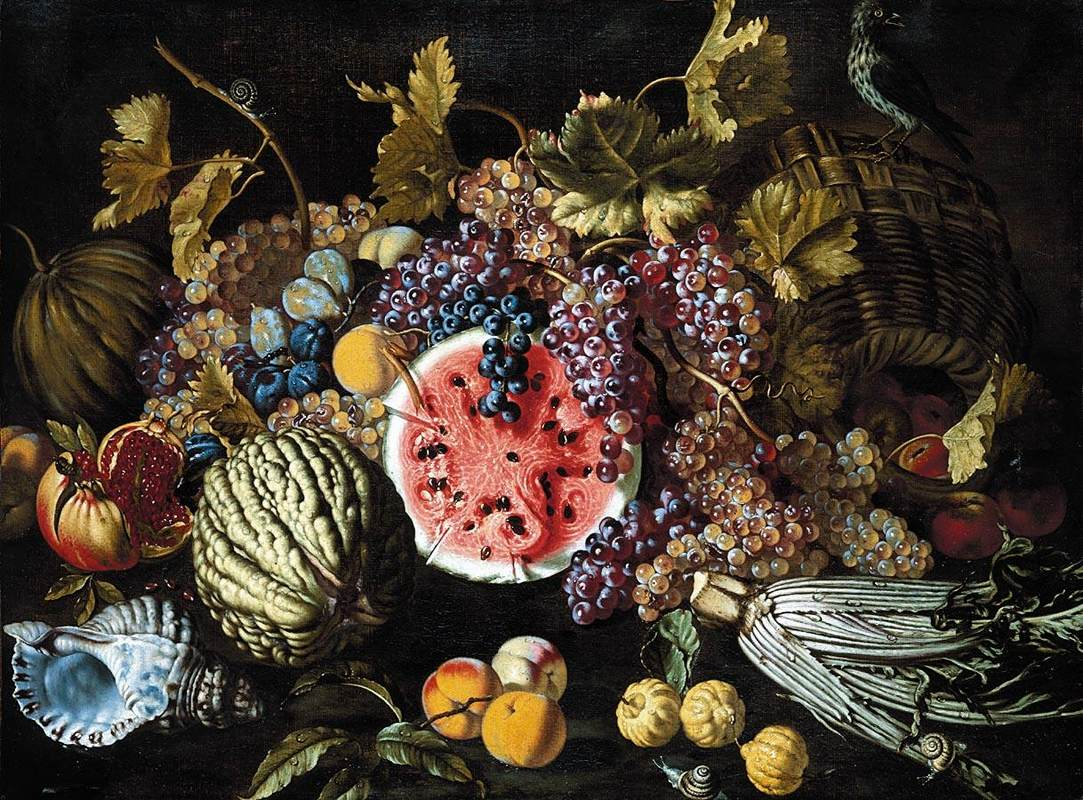 Bodegon con frutas de Giovanni Battista Ruoppolo (1629-1693), óleo sobre lienzo de 87 x 116 cm.